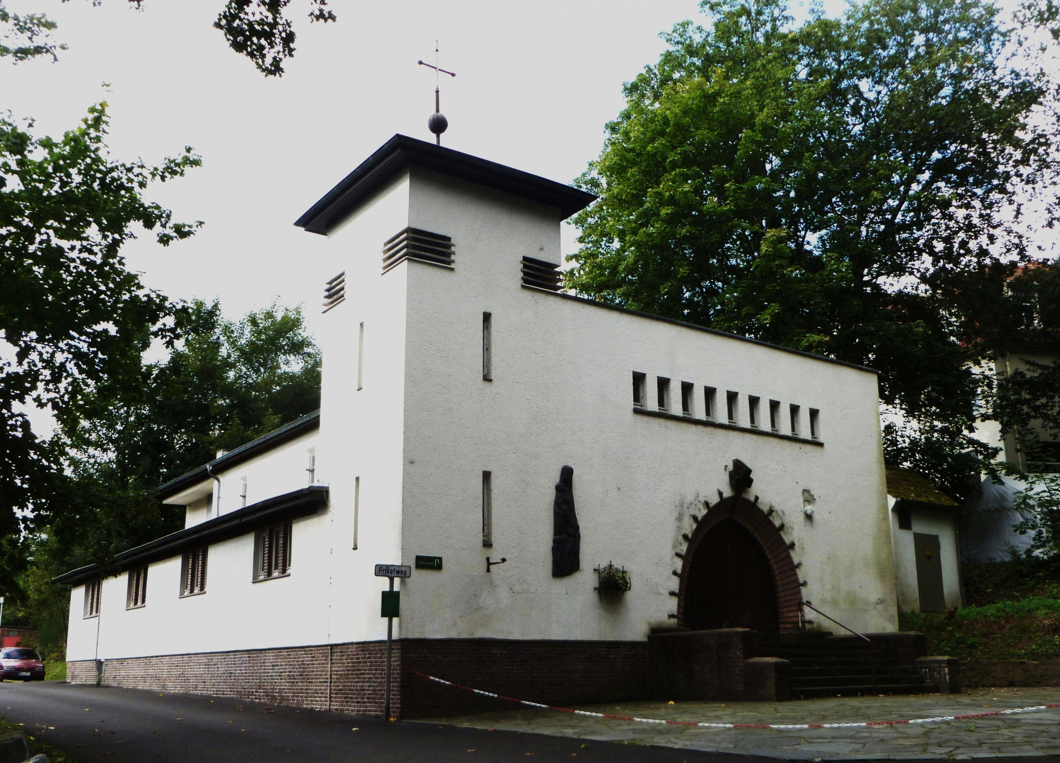 Kapelle St. Mariä Geburt der Jugendeinrichtung Maria im Tann, Aachen-Preußwald